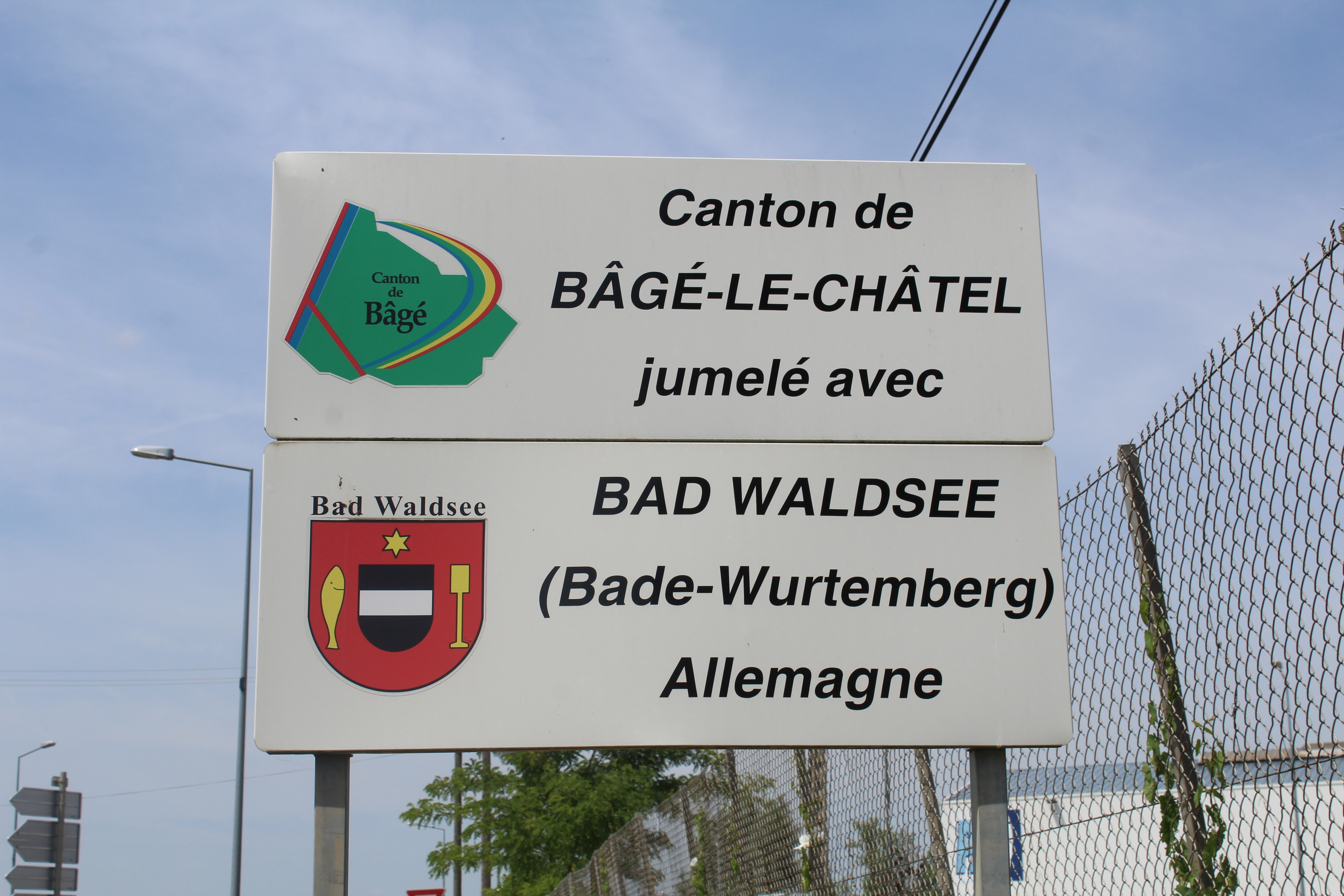 Panneau de jumelage entre le canton de Bâgé-le-Châtel et Bad Waldsee à Replonges.